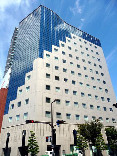 JIN・ORIXビル